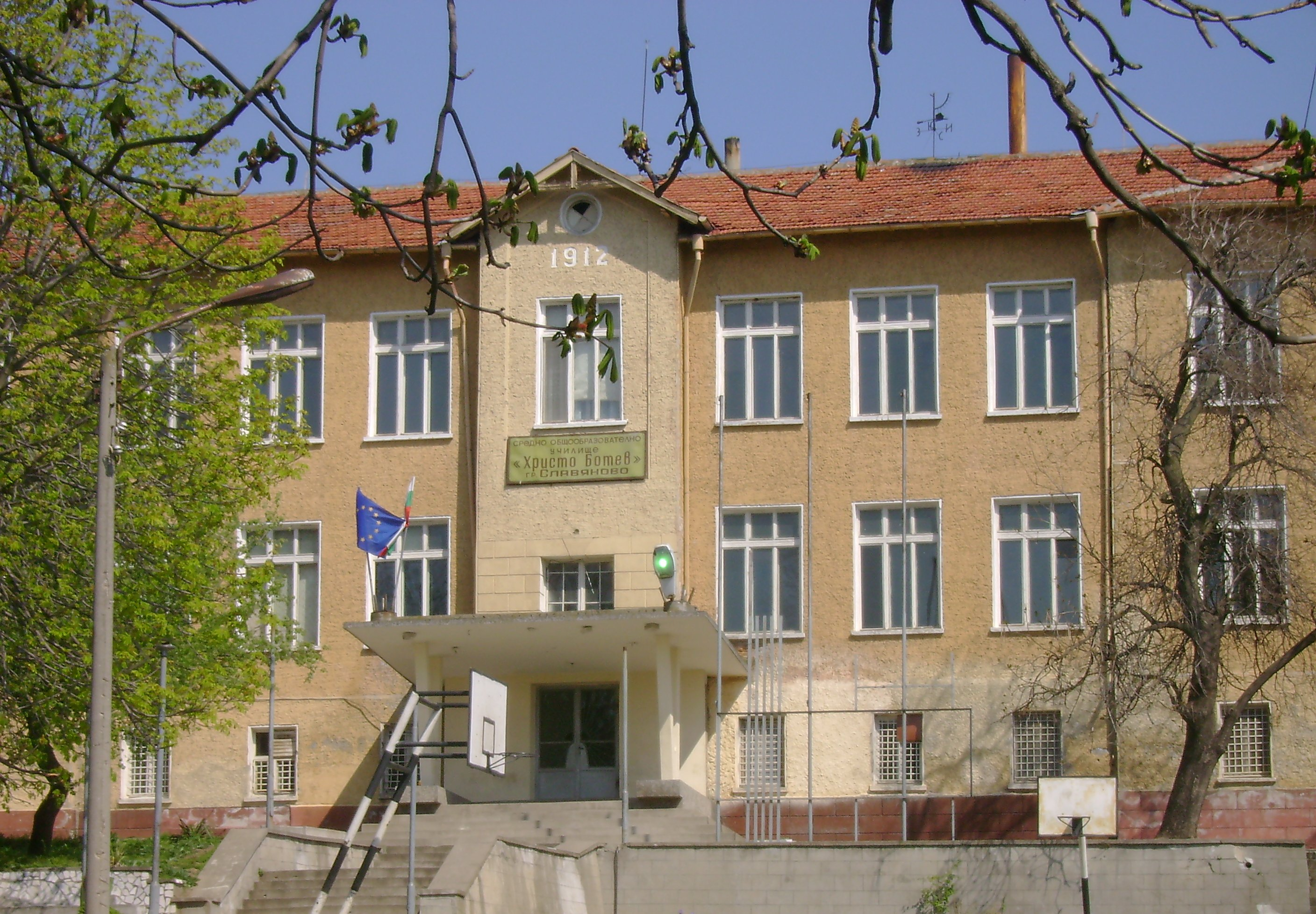 Slavyanovo, Pleven Province, Bulgaria